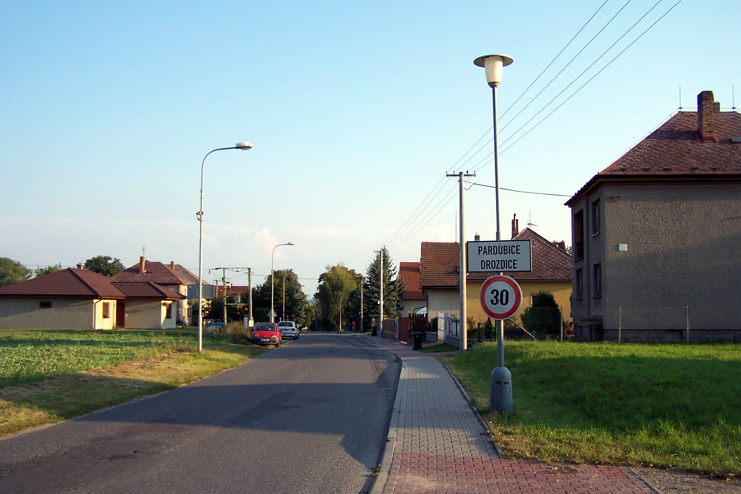 Drozdice. GPS: 50°1'4.041"N, 15°49'4.238"E